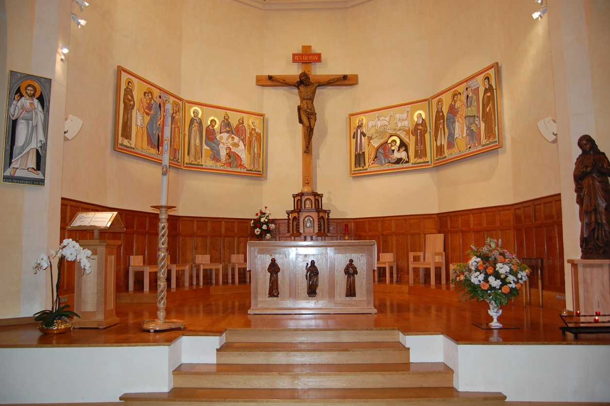 Choeur